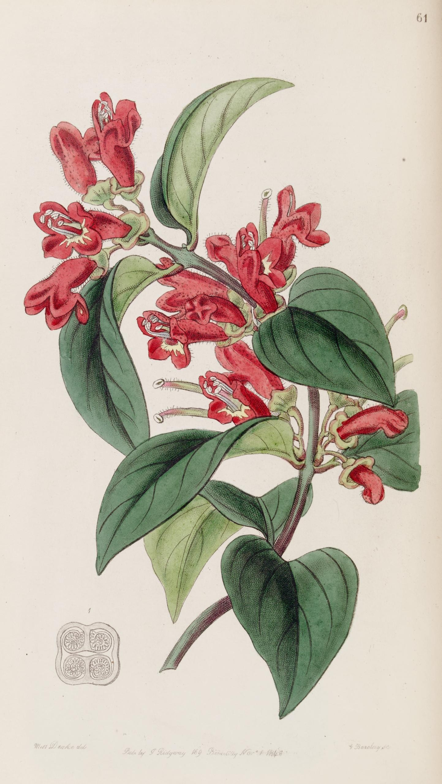 Vermilion Aeschynanth (Aeschynanthus miniatus)